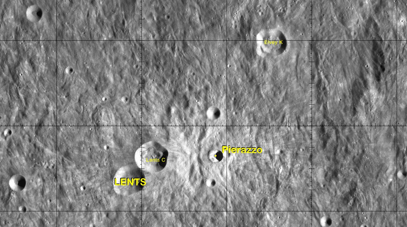 Cráter lunar Pierazzo. Localización. (Imagen LRO)